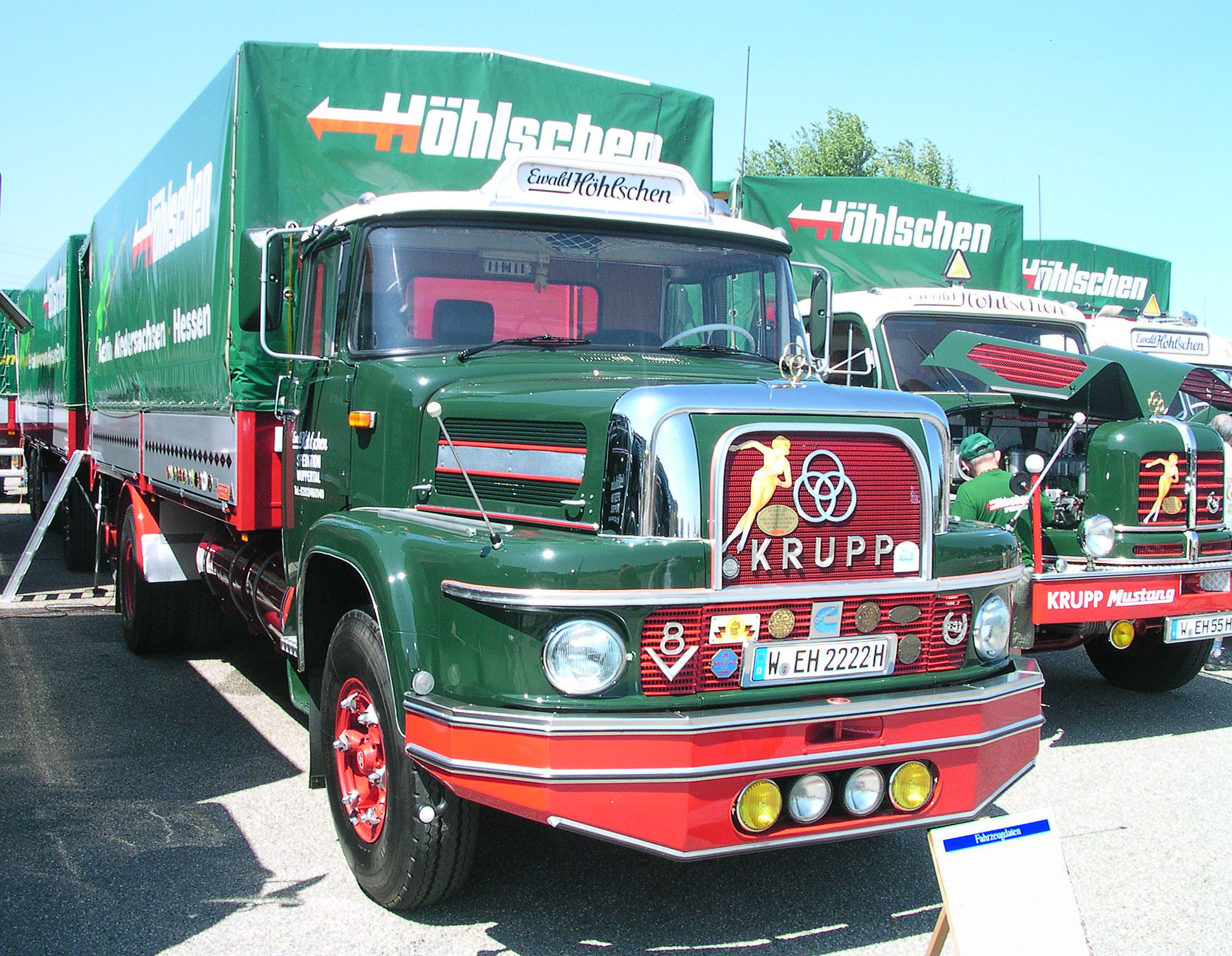 Wörth am Rhein, Oldtimer-Treffen bei Daimler-Chrysler Krupp 1080, Baujahr 1962, Cummins V8 Dieselmotor V 903, 236 Kw (320 PS) bei 2400 u/min, 13400 ccm Hubraum, 105 km/h